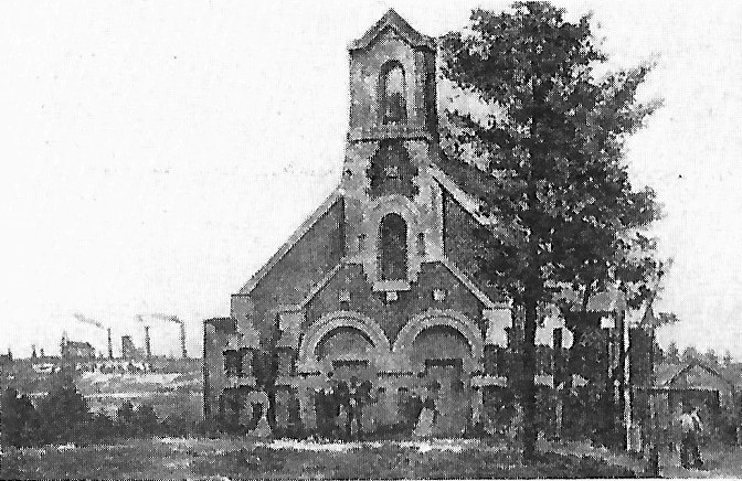 Lorette-Kapelle, Oktober-November 1914